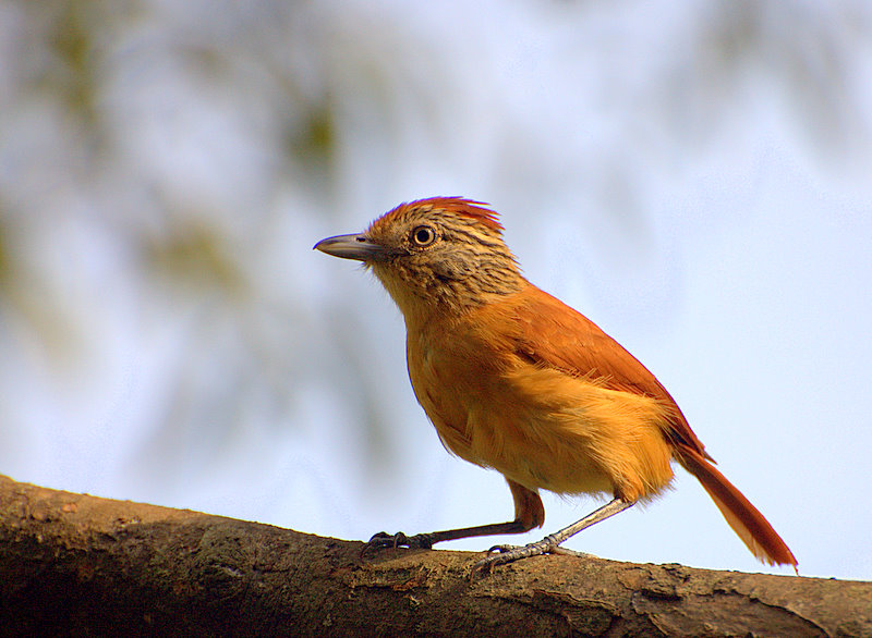 Thamnophilus doliatus Piraju-SP, no Jardim da cadeia"